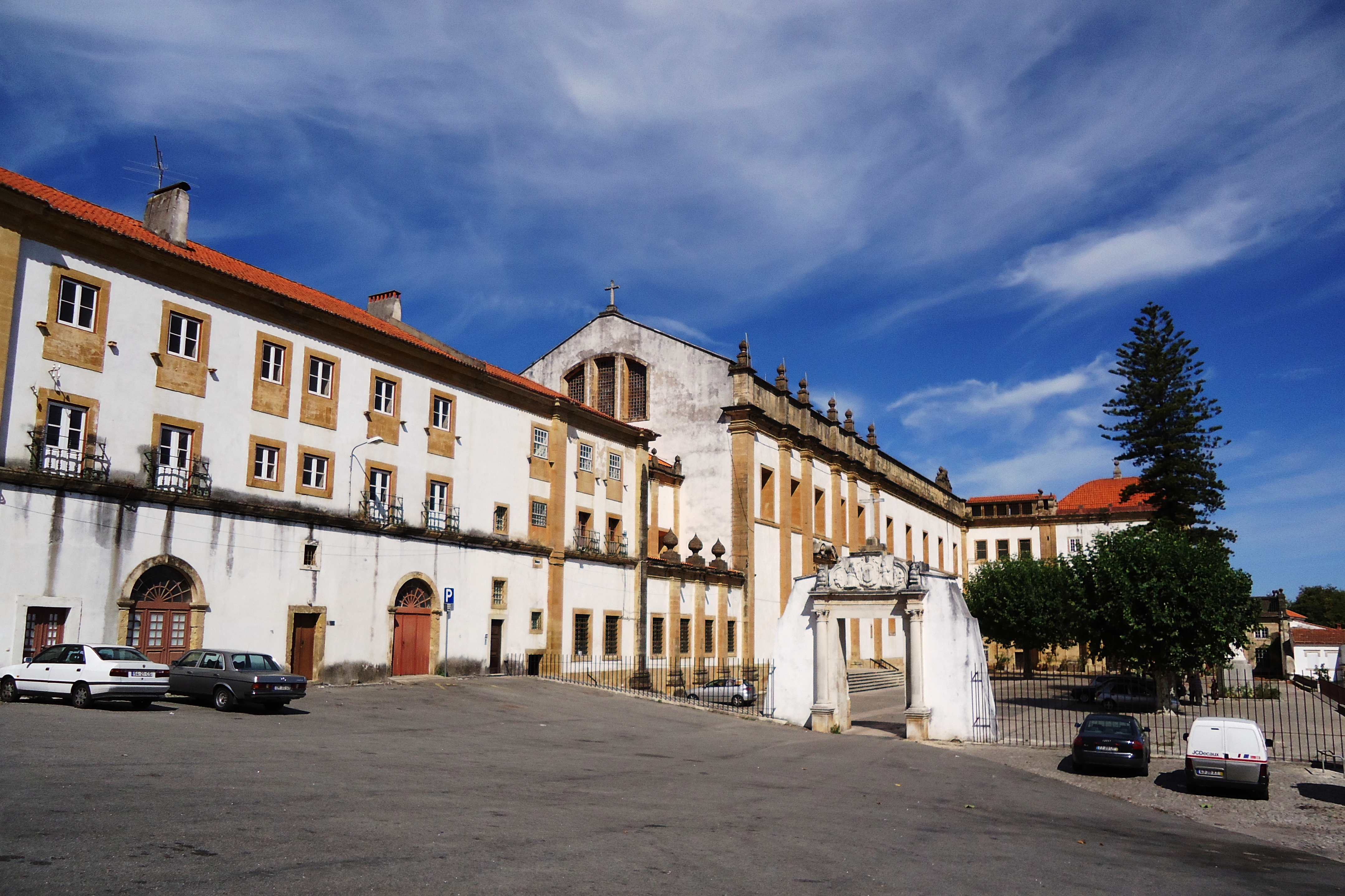 Convento de Santa Clara-a-Nova, freguesia de Santa Clara, cidade, concelho e distrito de Coimbra, Portugal: panorâmica da área envolvente pelo lado do rio Mondego.